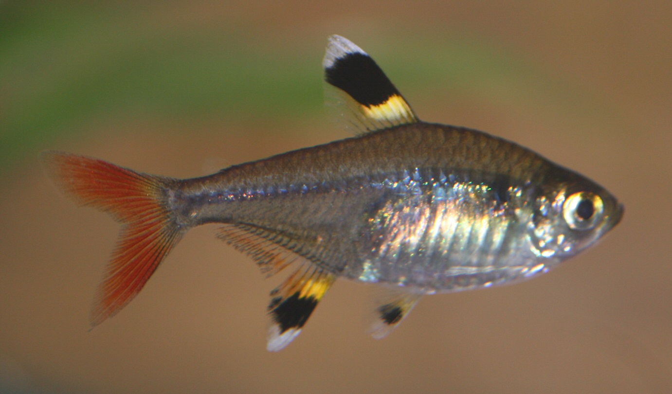 Pristella maxillaris taken by me user debivort november 2006